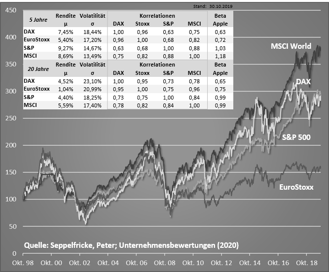 Marktentwicklung verschiedener Indizes